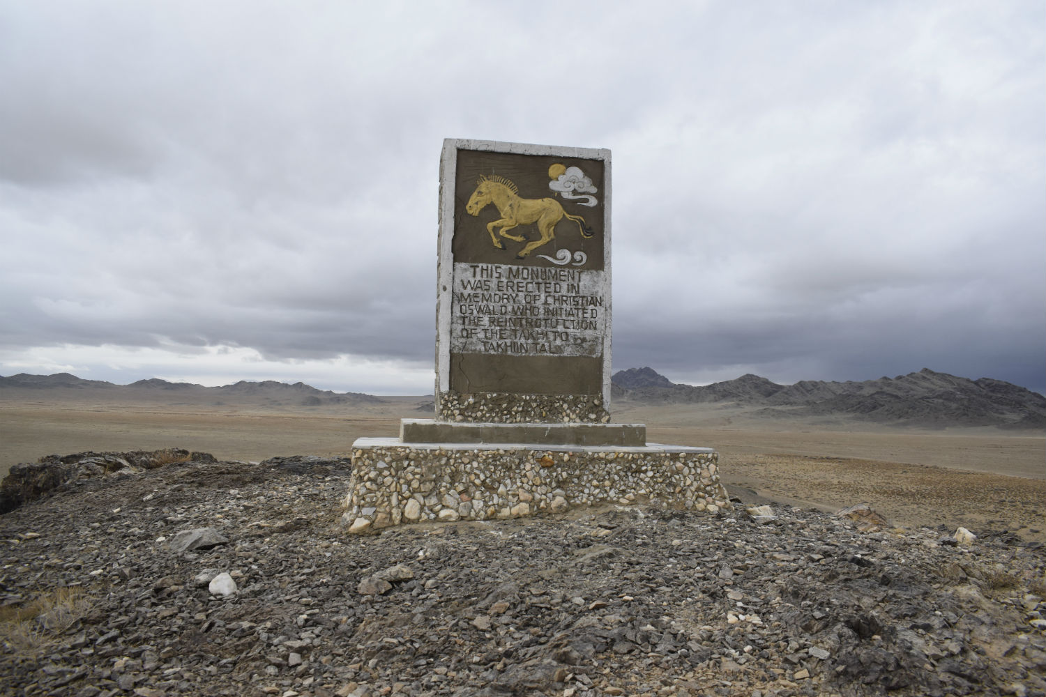 Монгол: takhiin tal